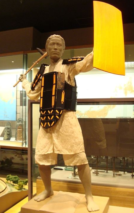 弥生時代の甲冑レプリカ